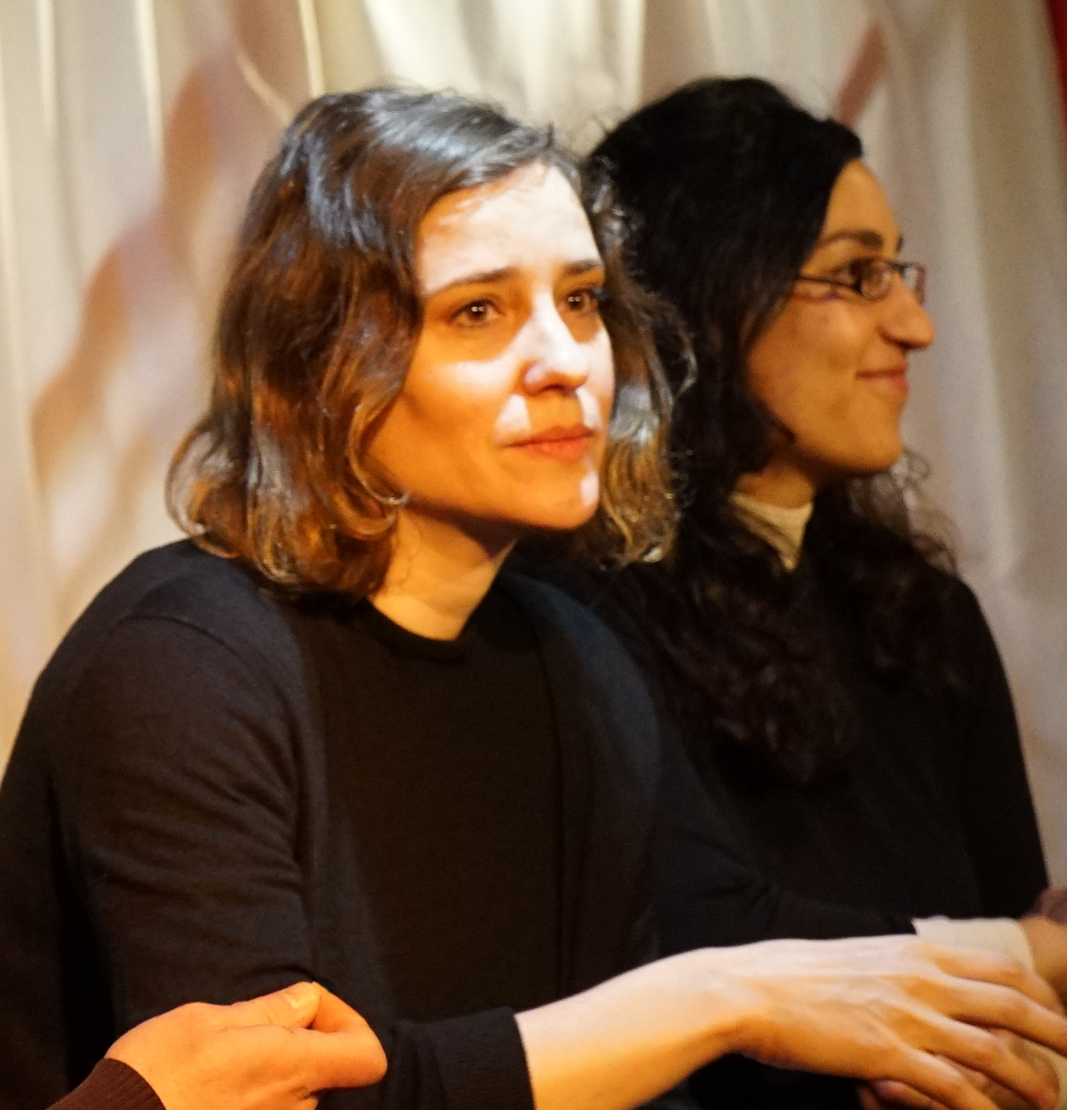 lors du festival.